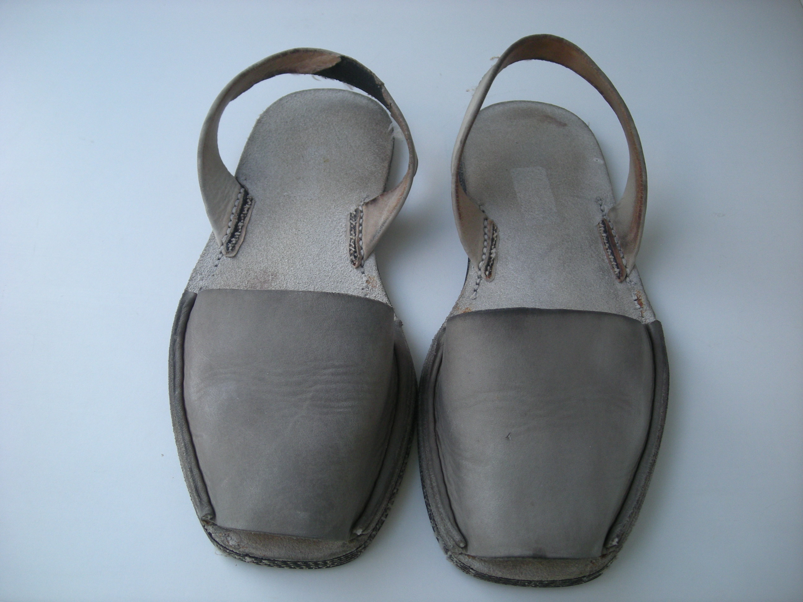 Avarques. Calçat tradicional menorquí.